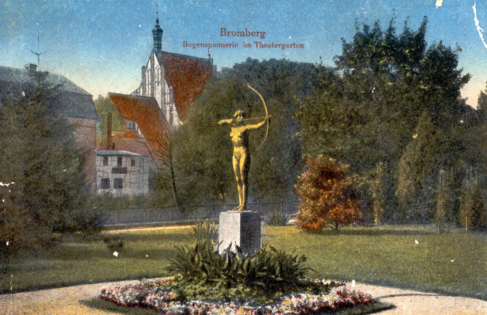 Pomnik Łuczniczki na Placu Teatralnym w Bydgoszczy